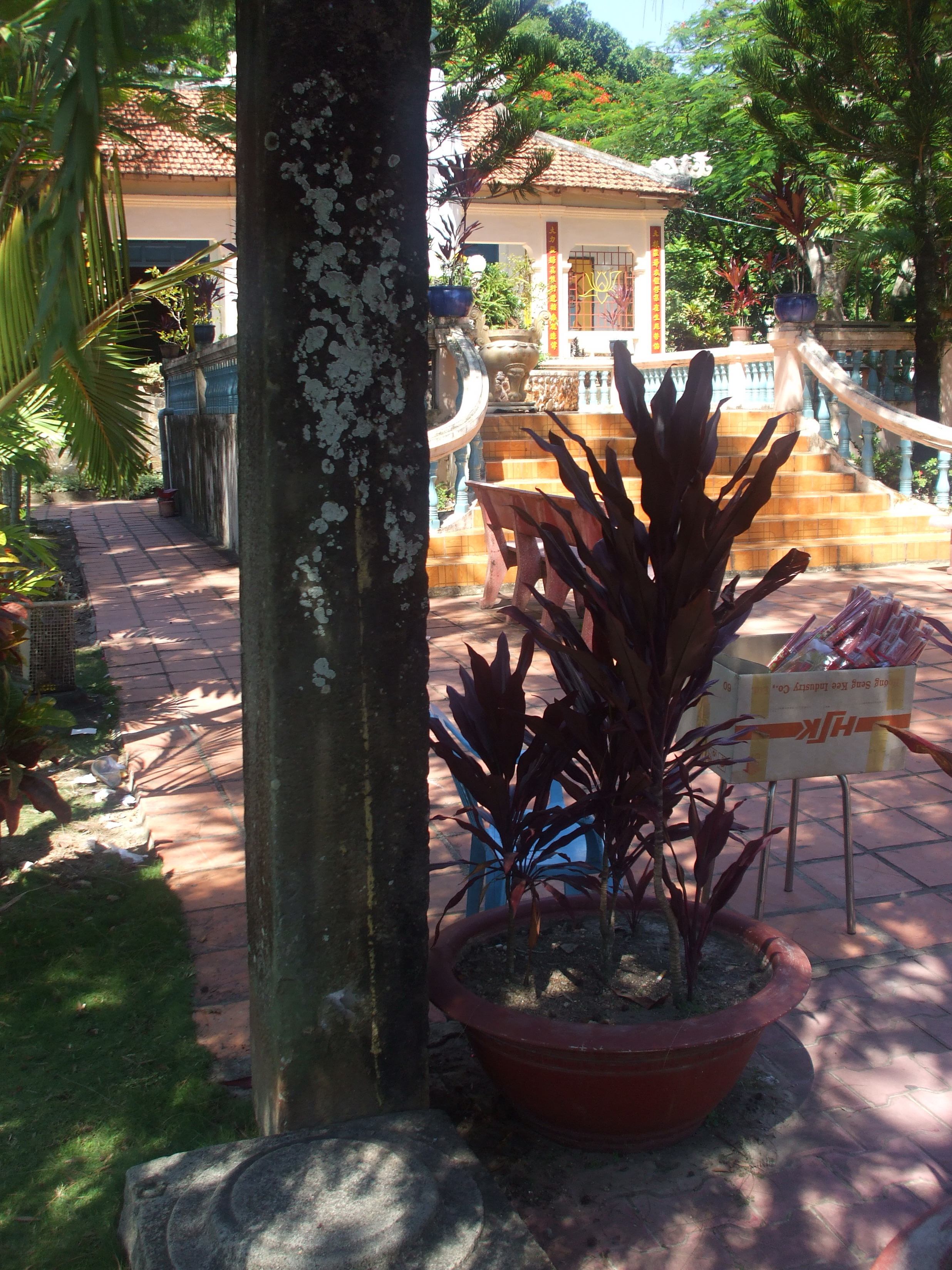 Cột đá và tảng đá kê cột, dấu vết của một công trình xưa ở chùa Phù Dung, Hà Tiên, Việt Nam.